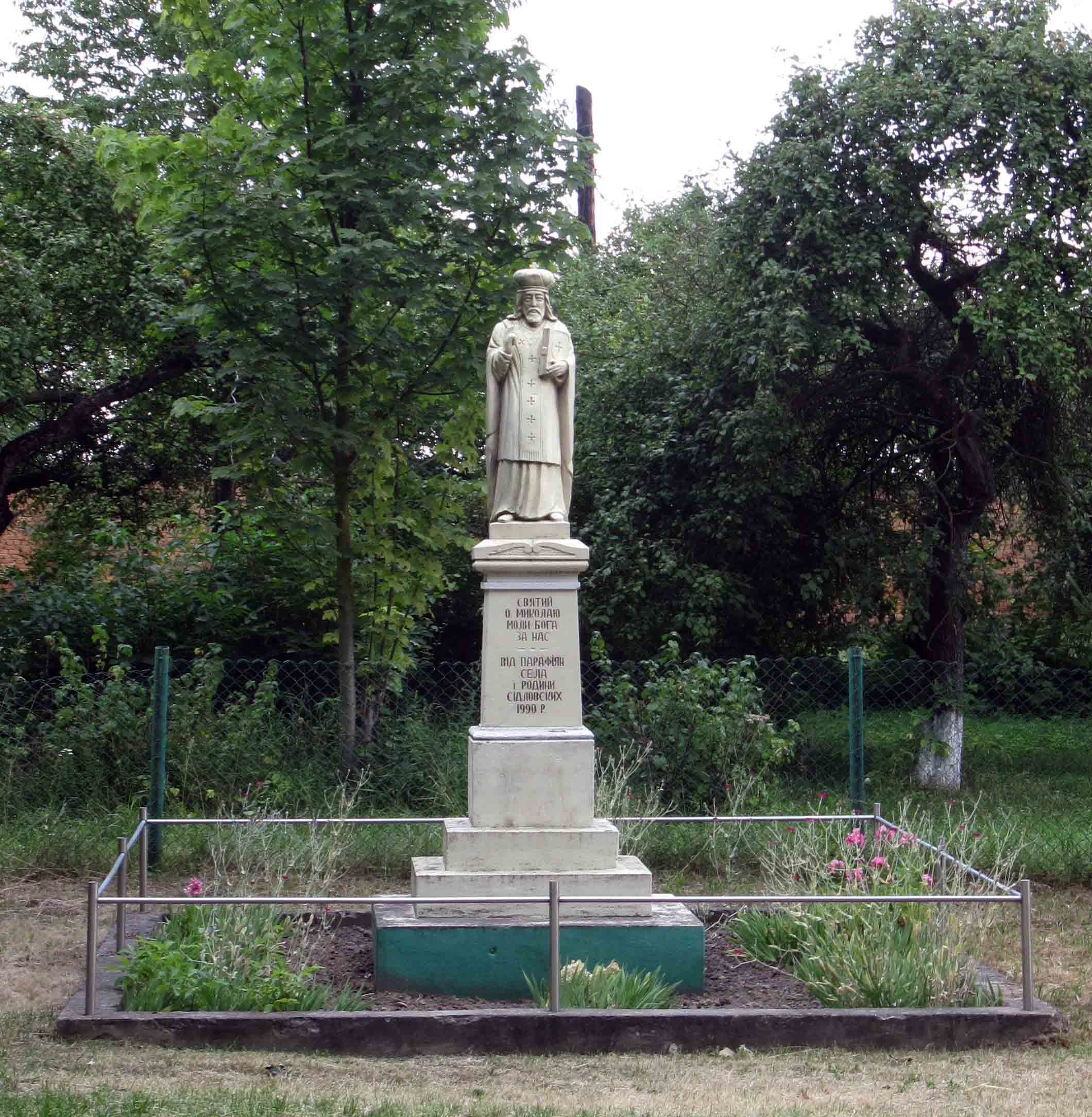 Фігура Святого Миколая у Гаях-Розтоцьких Зборівського району Тернопільської області